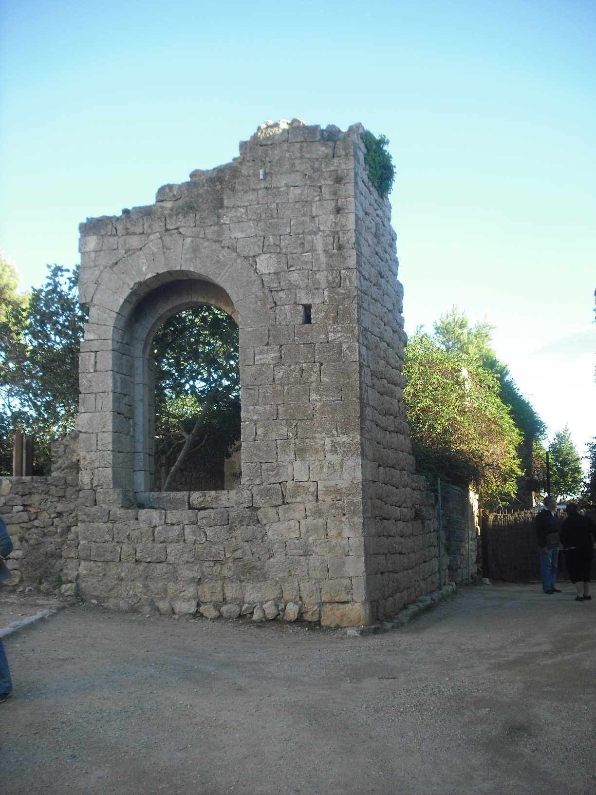 Runes del castell de Sant Martí d'Empúries.